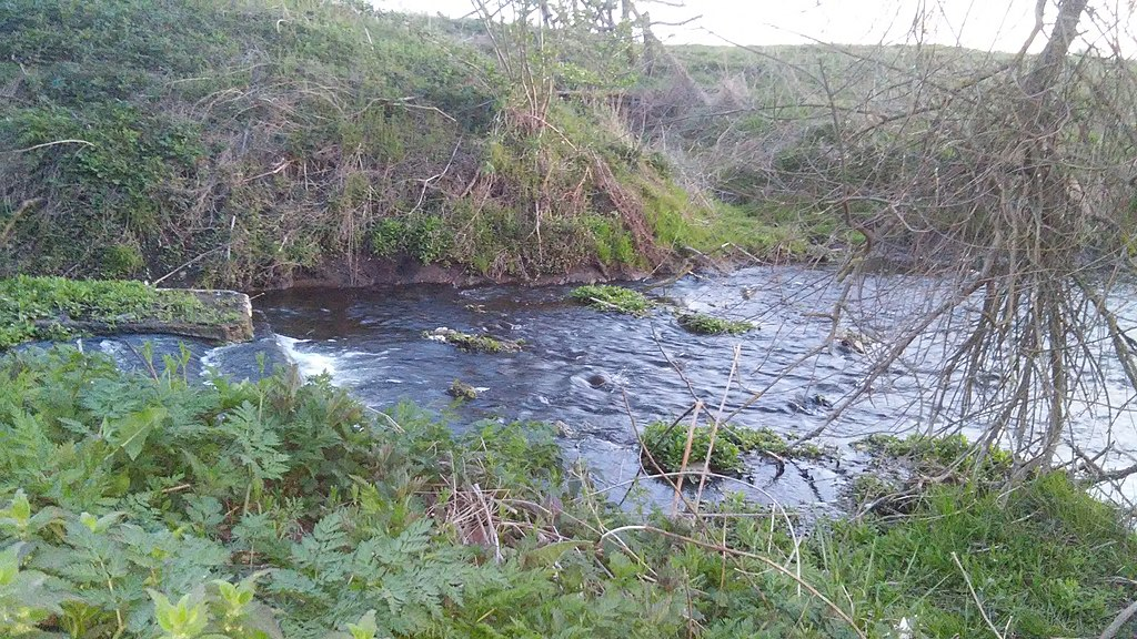 Річка Спасівка в південній частині села Перв'ятичі.